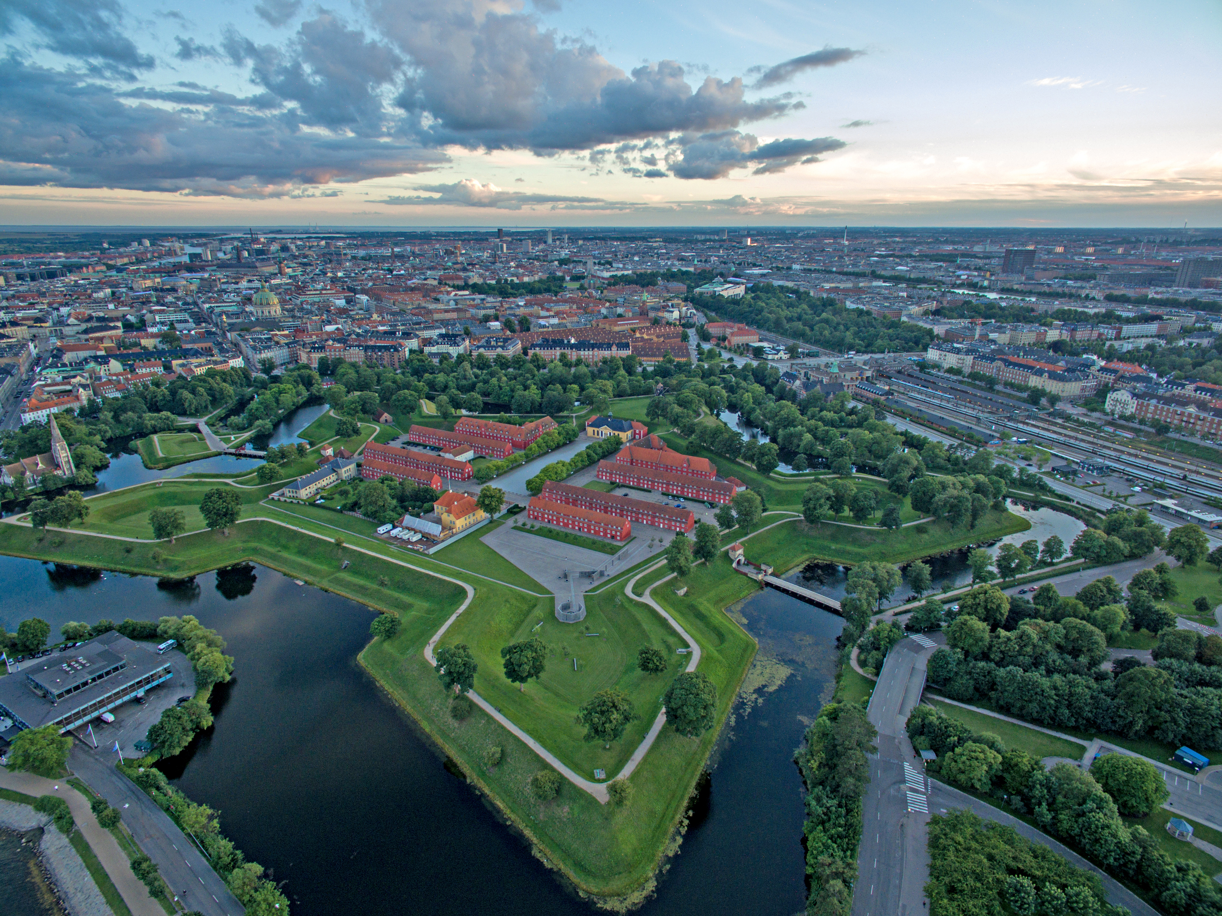 Kastellet in Copenhagen, Denmark